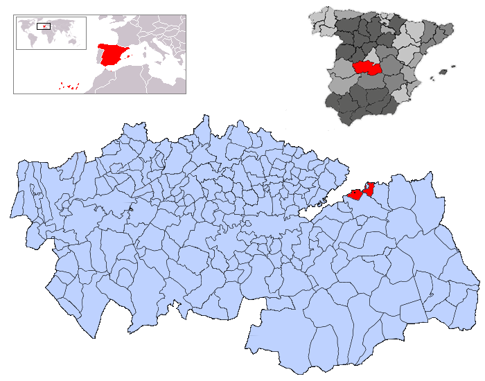 Ontígola en la provincia de Toledo